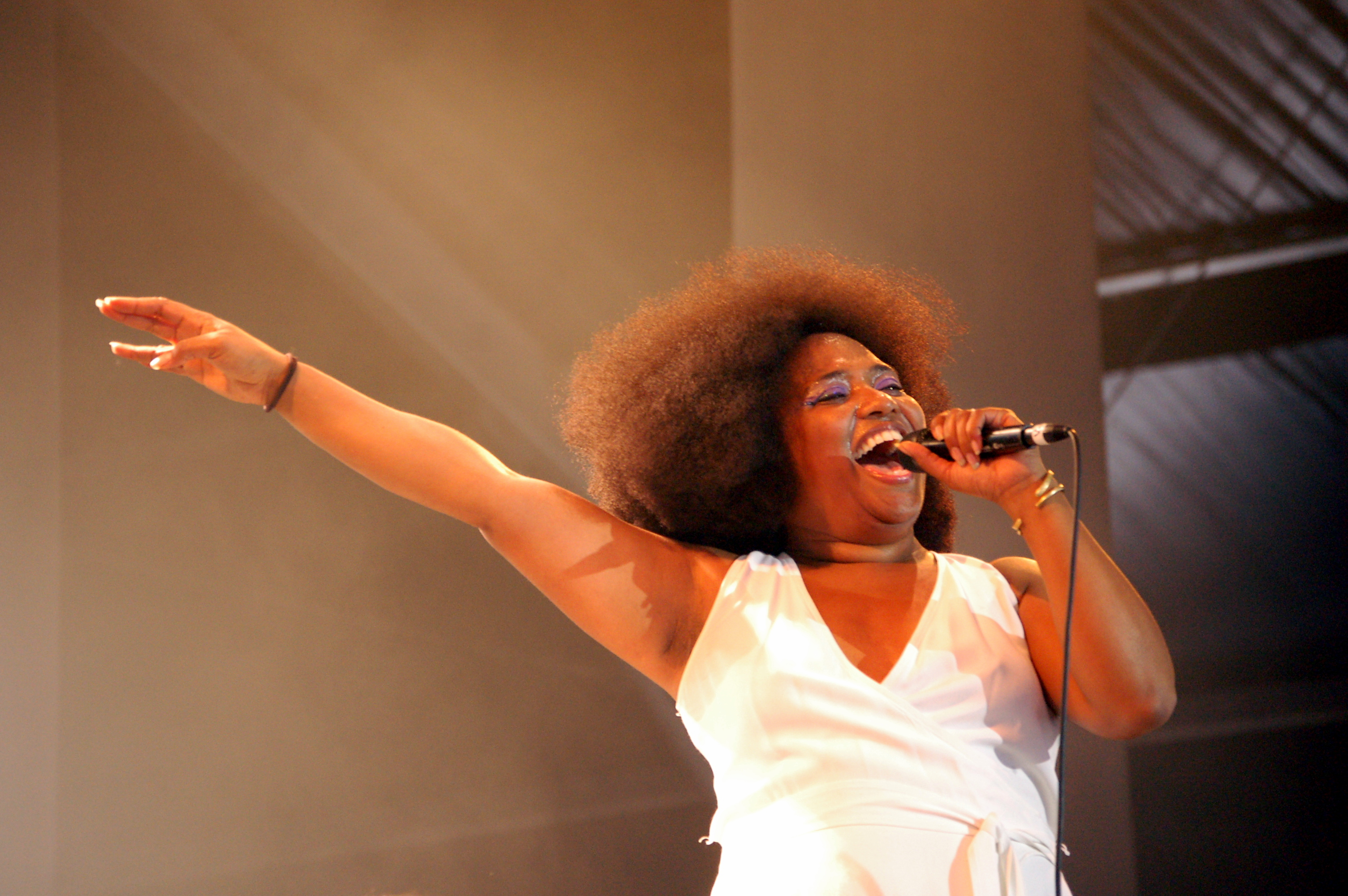 The Bellrays en concert à Art Rock (Saint-Brieuc)